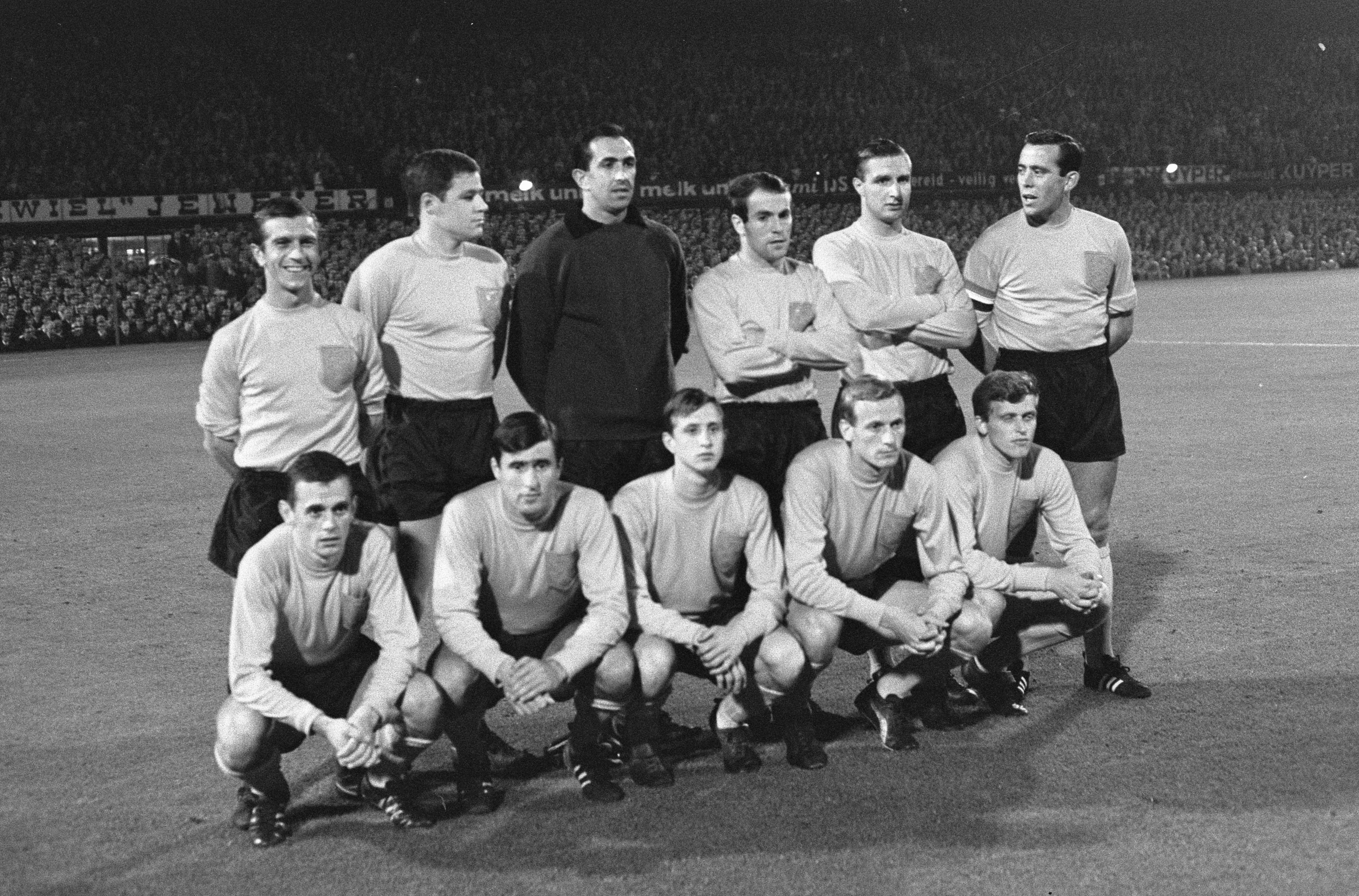 Johan Cruijff tijdens zijn debuut bij het Nederlands elftal in 1966. Op de foto staand; Flinkevleugel, Israel, Pieters Graafland, Muller, Veldhoen, Schrijvers. Zittend; Pijs, Swart, Cruijff, Nuninga, Keizer